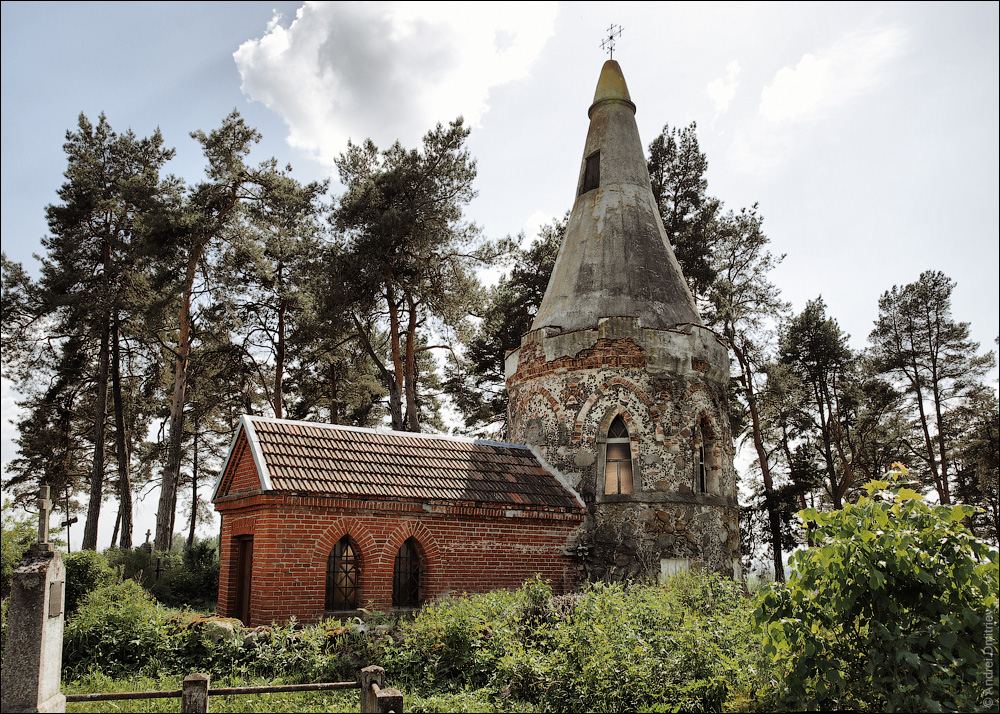 Рэпля. Капліца-пахавальня